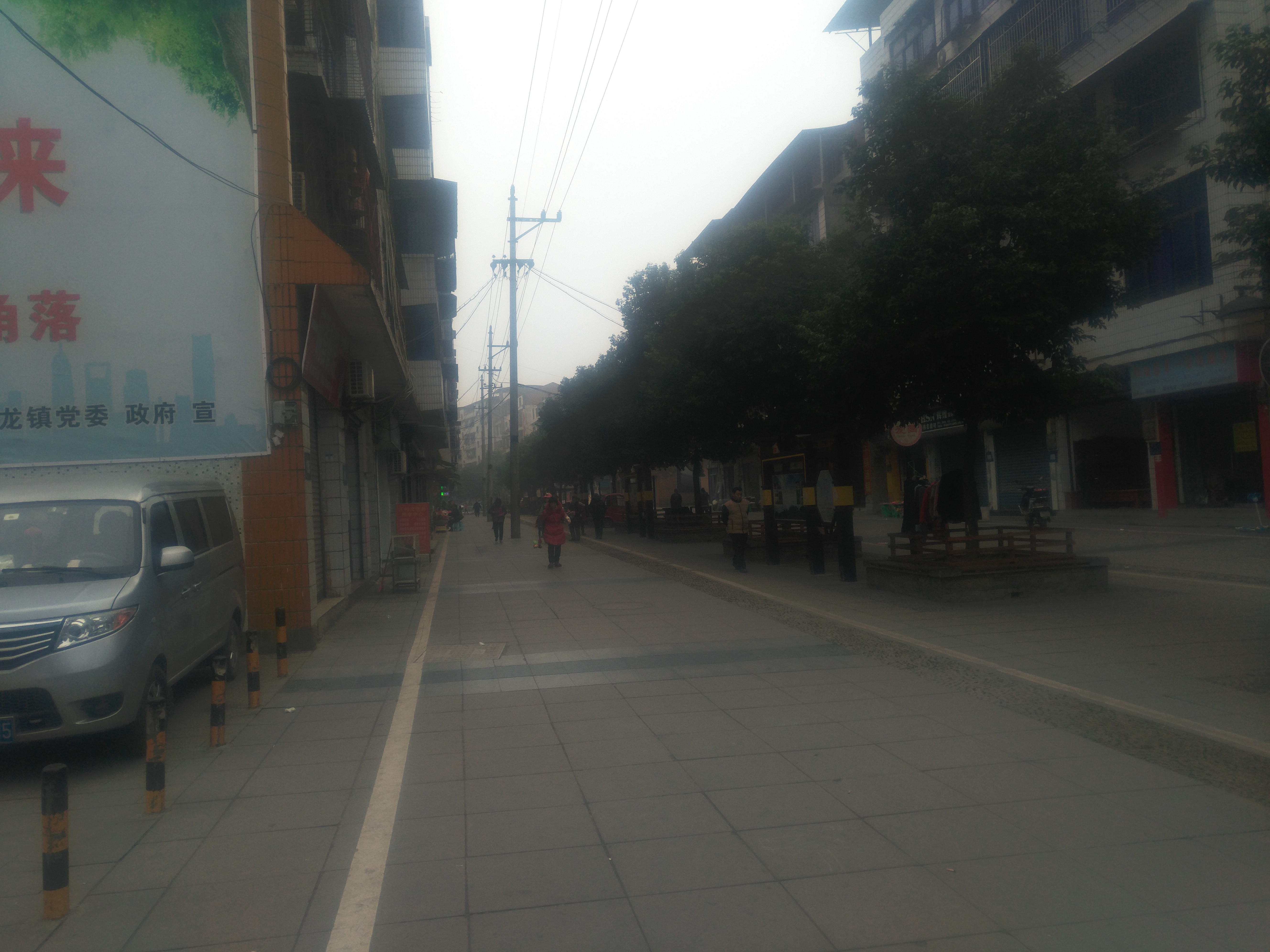 A government building in Shuanglong town, Longevity district, Chongqing, China